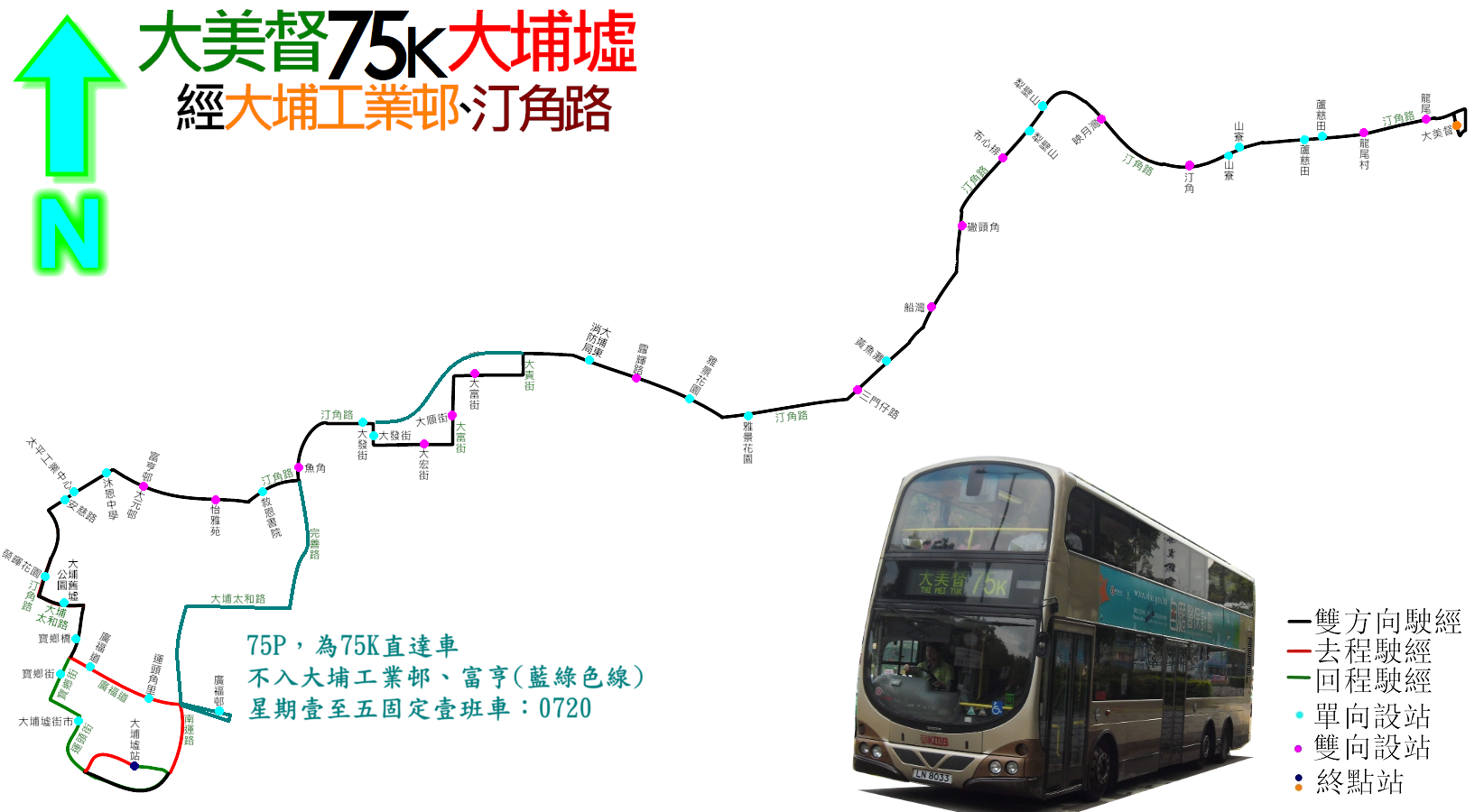 中文（香港）: 九巴75K線的走線圖